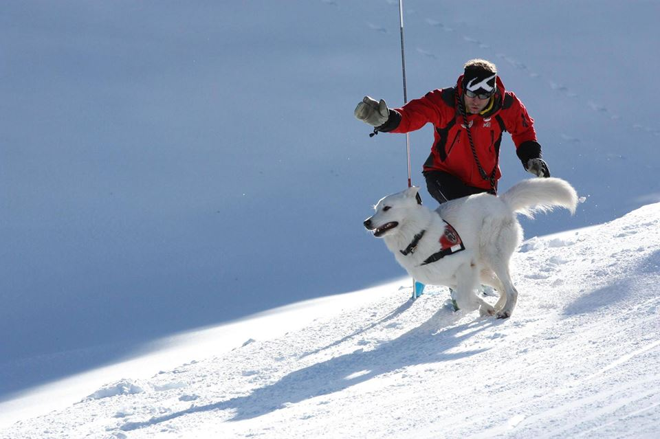 Weißer Schweizer Schäferhund Merlin Aragon vom weißen Wächter, Lawinen- und Vermisstensuchhund